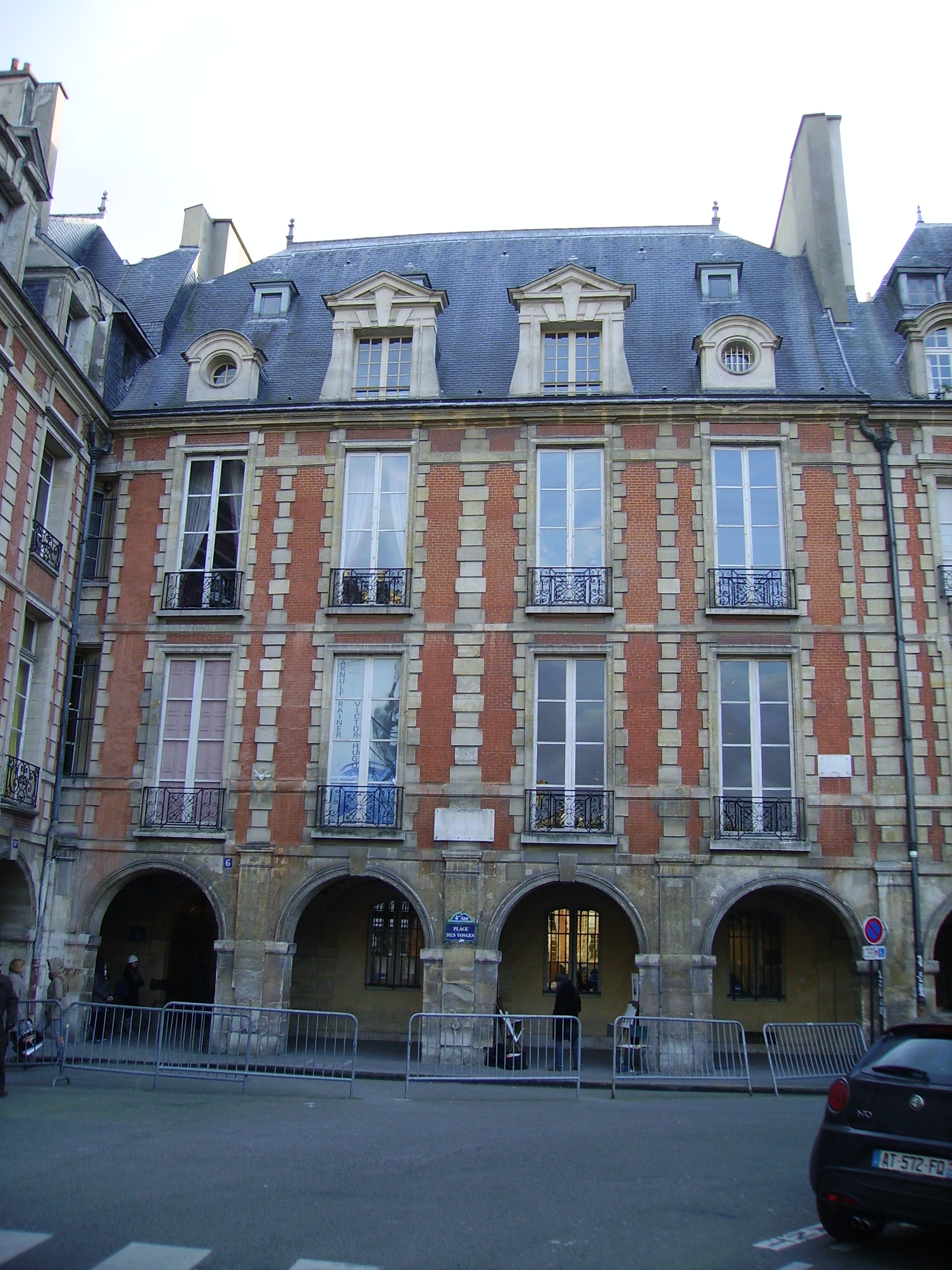 Hôtel Arnaud - 6 place des Vosges